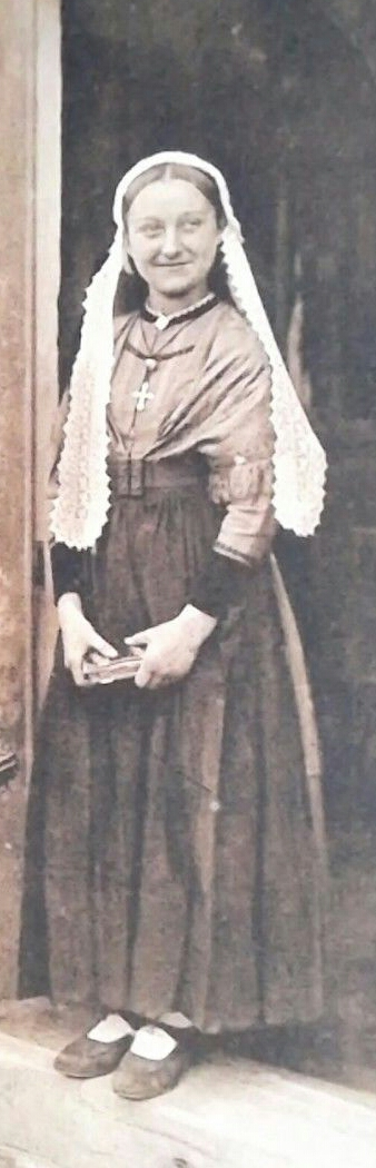 Coiffe des Côtes de Vendée en 1900 à la sortie de la messe.